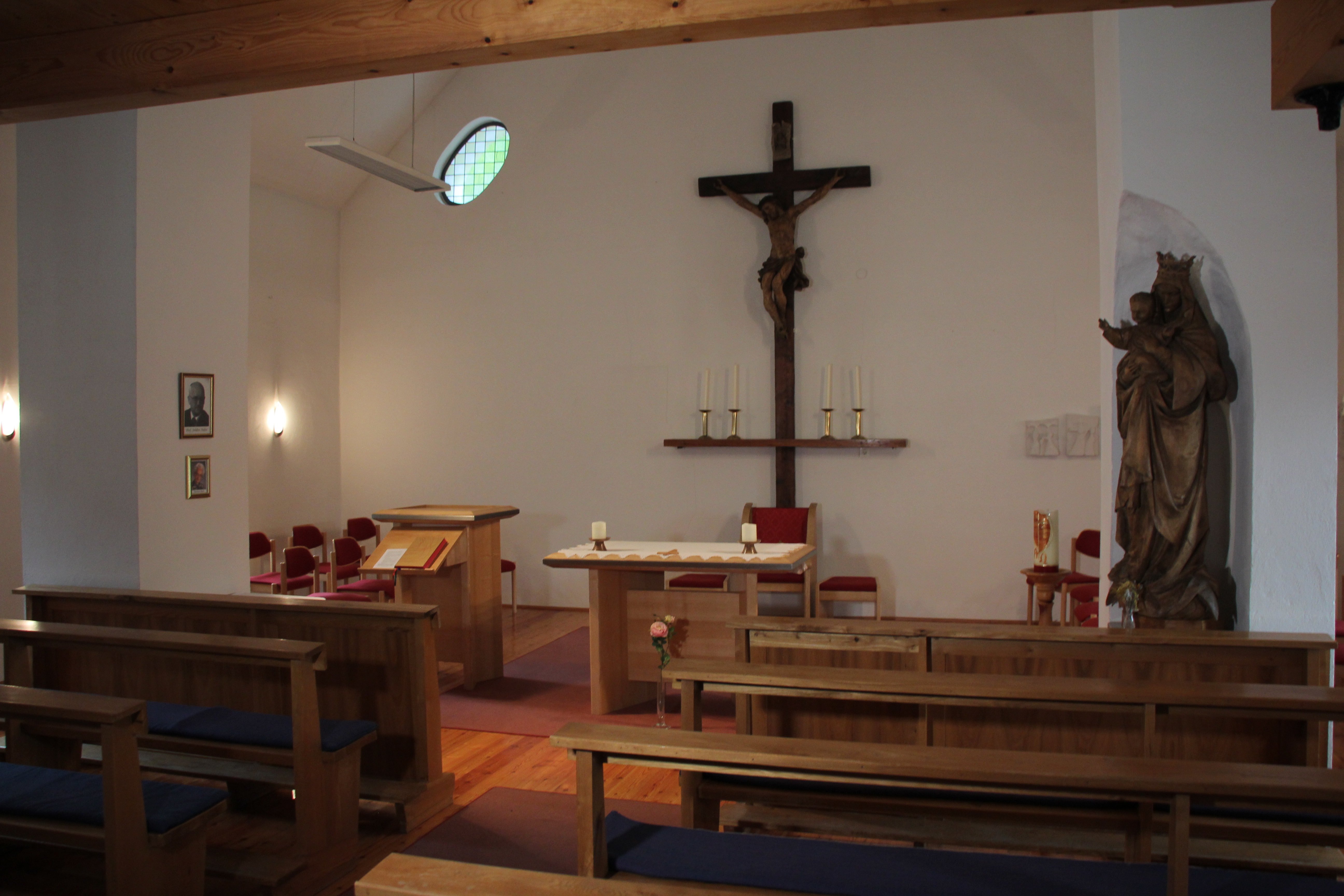 Besuch des Trattenbachtales im Rahmen der KulTour von WMAT